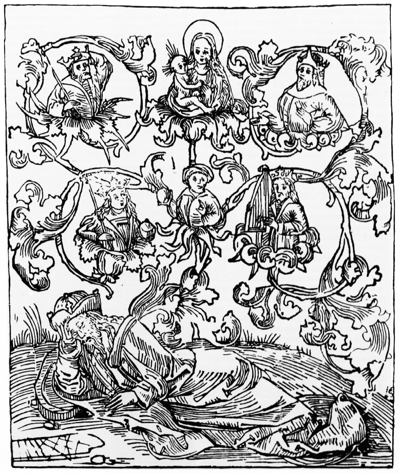 "Генеалагічнае дрэва Ісуса" ("("Сiй есть корень Иесеовъ. С него же изыде царь Давыдъ и Соломонъ и иные цари Израілевы, и господь наш Iсус Христос"). Псалтыр. Прага, 1517. ар.1. 130Х110 мм.